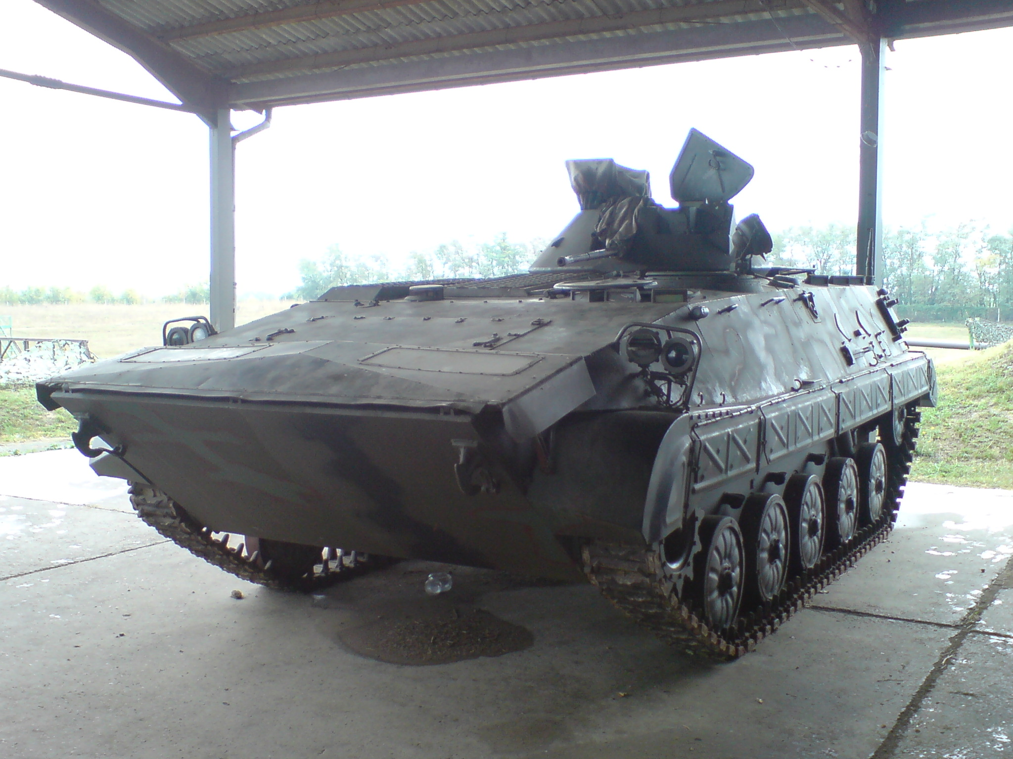 Oklopnjak u vukovarskoj vojarni